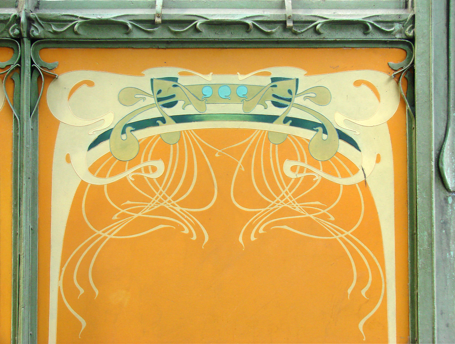 La station PORTE DAUPHINE - Place du Paraguay Station de métro ouverte en 1900. C'est le plus bel édicule conçu par Hector Guimard (1867-1942) à Paris.